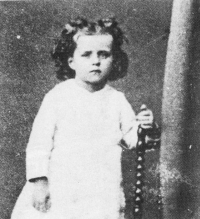 Teresa di Lisieux nel 1876.